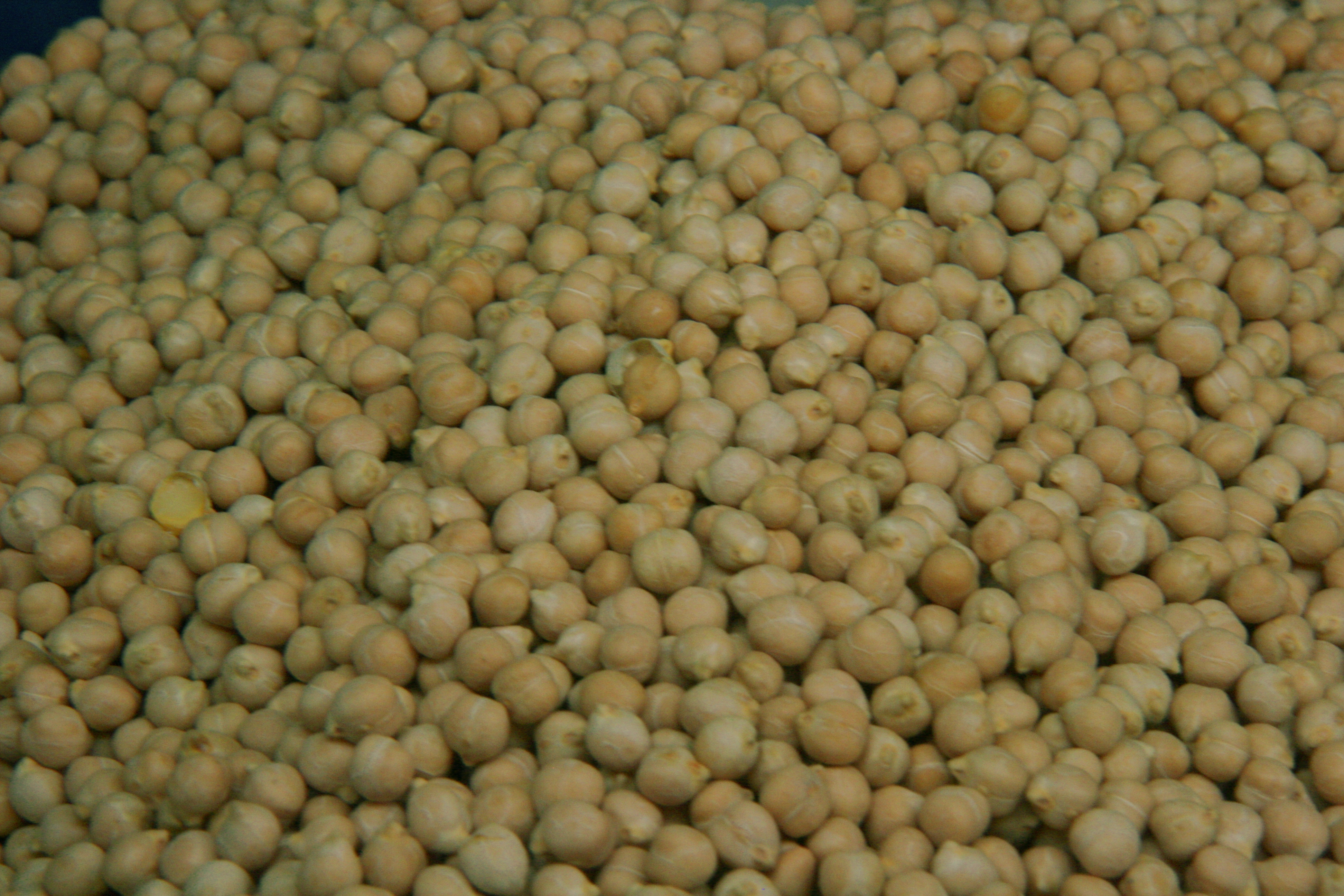 Garbanzos Pedrosillano (Pedrosillo el Ralo)